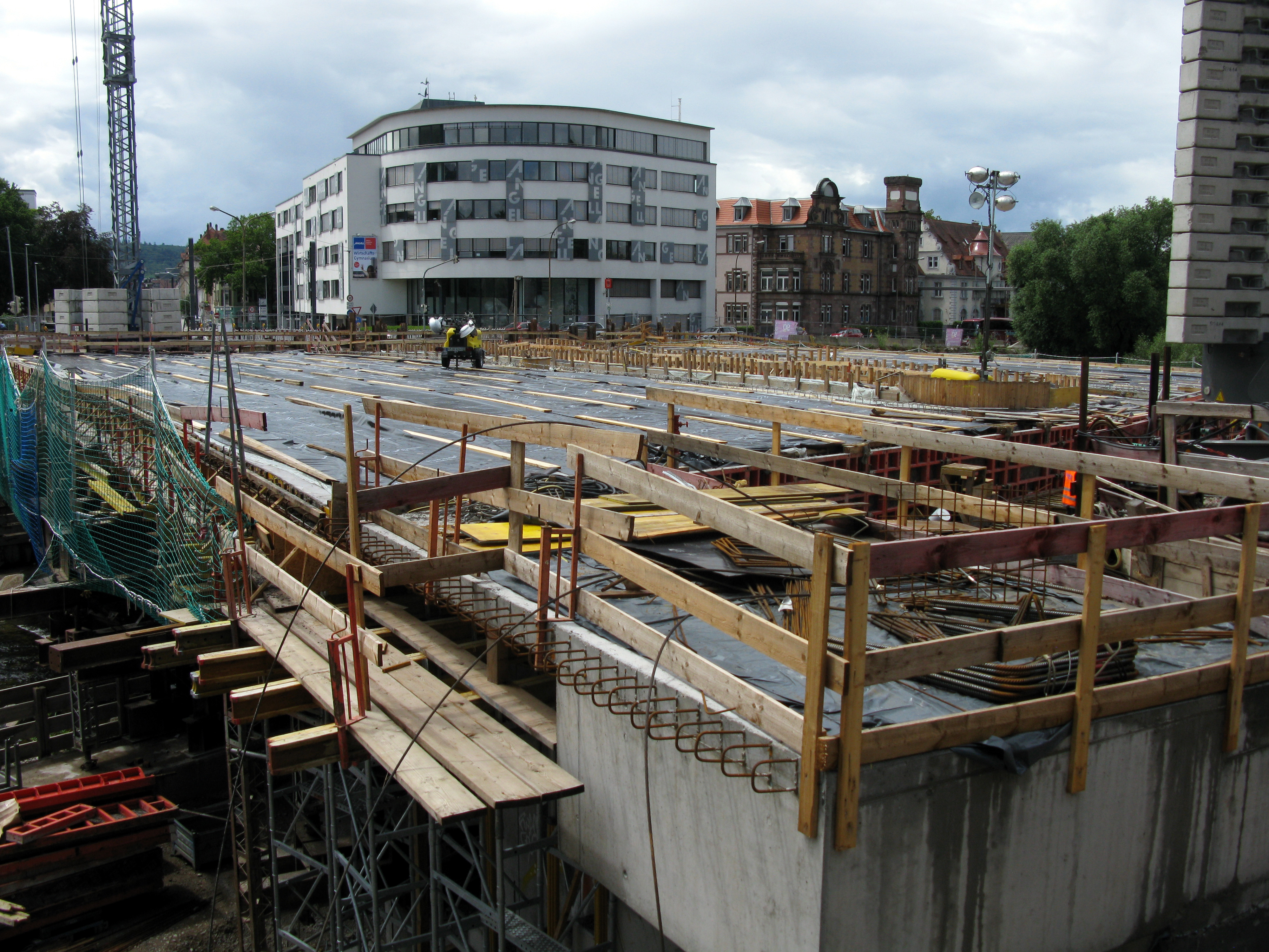 Freiburger Kronenbrücke einen Tag nach der Betonierung